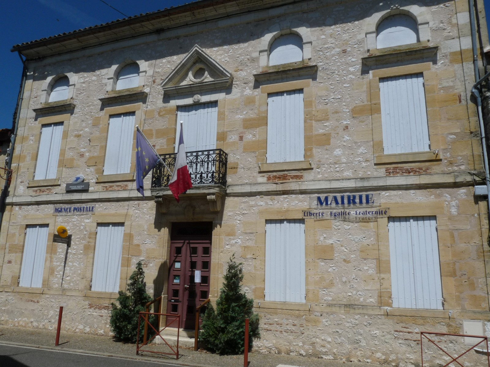 Mairie d'Eynesse, Gironde, France